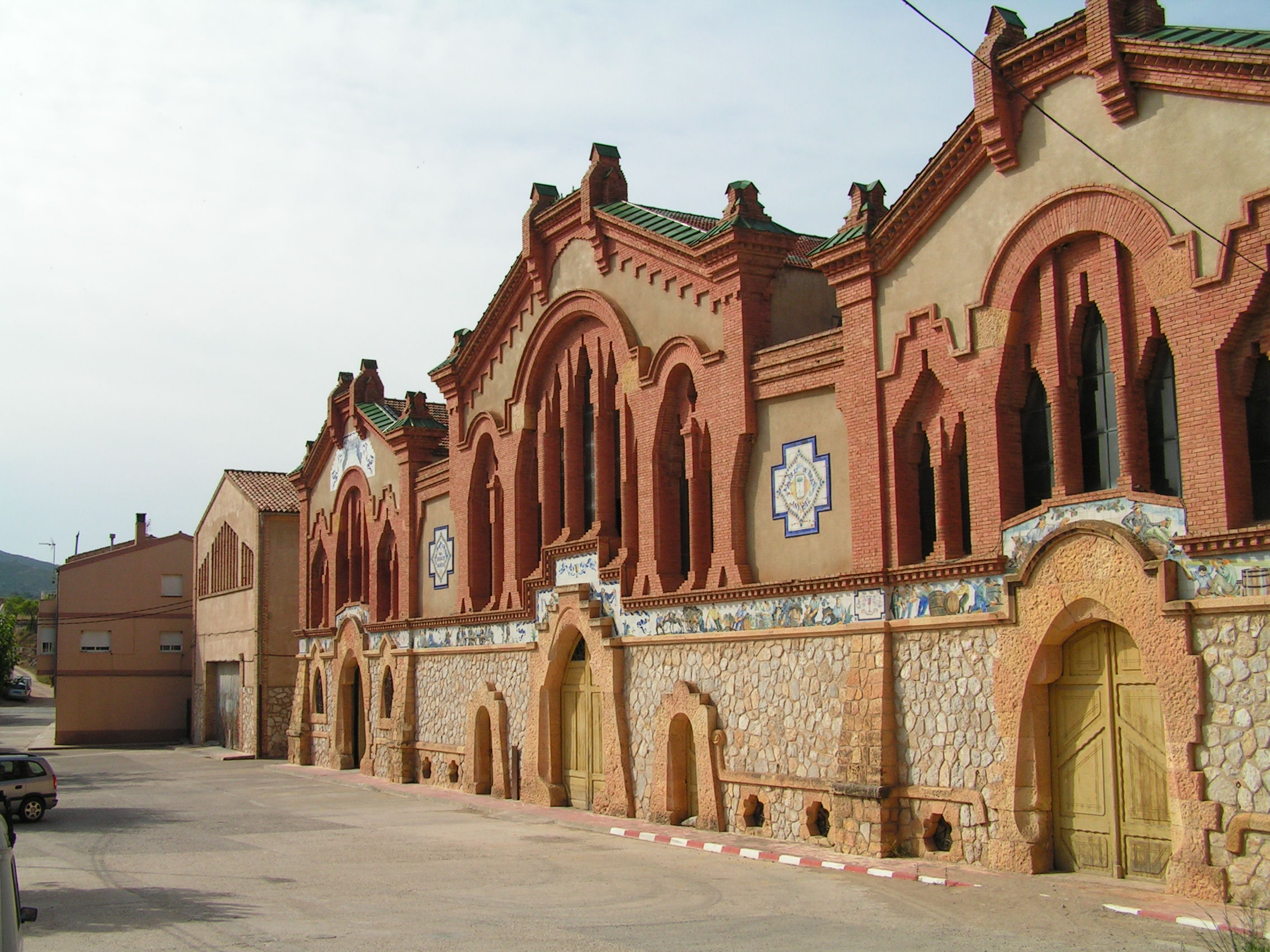 Celler cooperatiu de Pinell de Brai, obra de l'arquitecte Cèsar Martinell